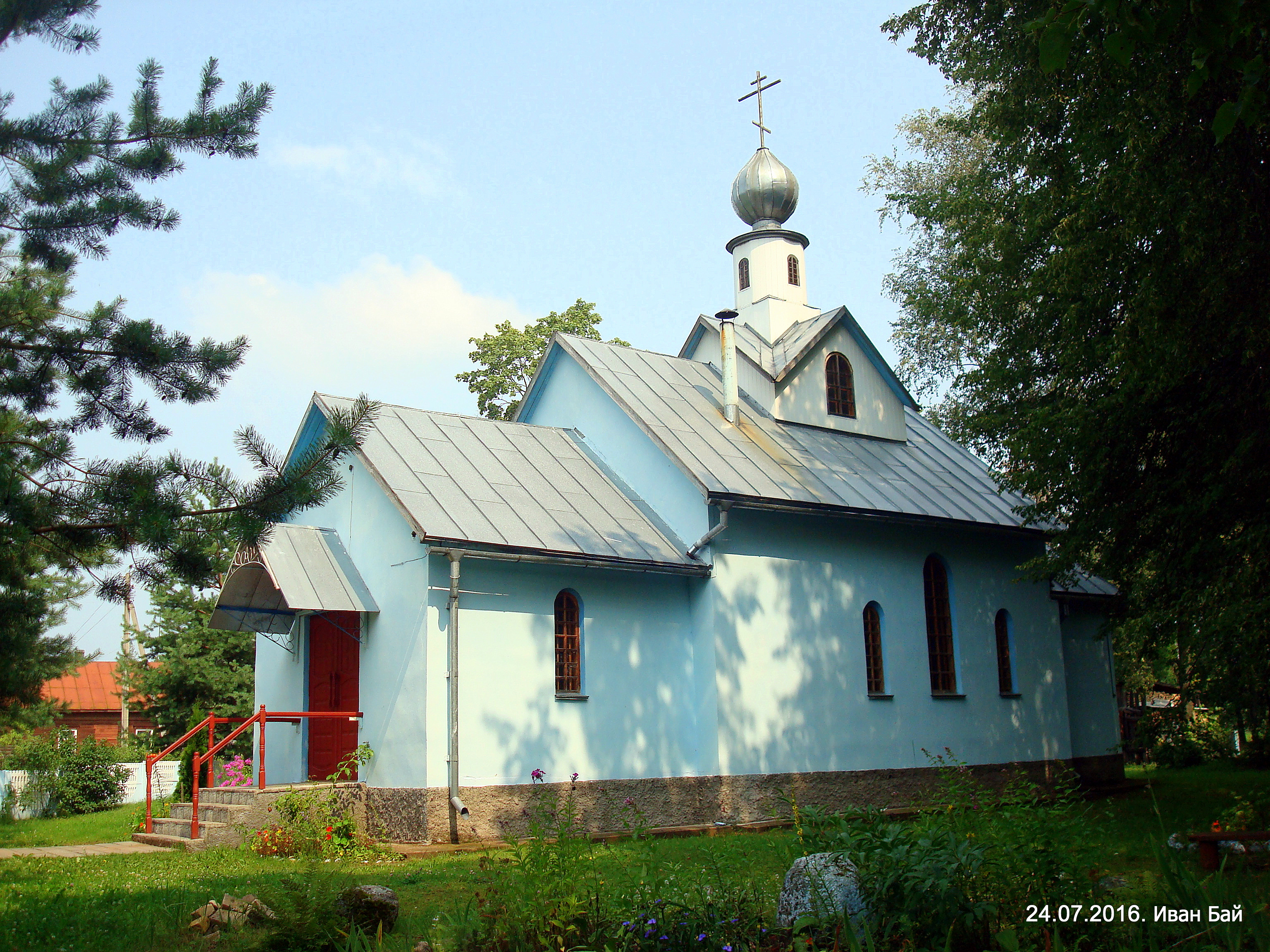 Церковь